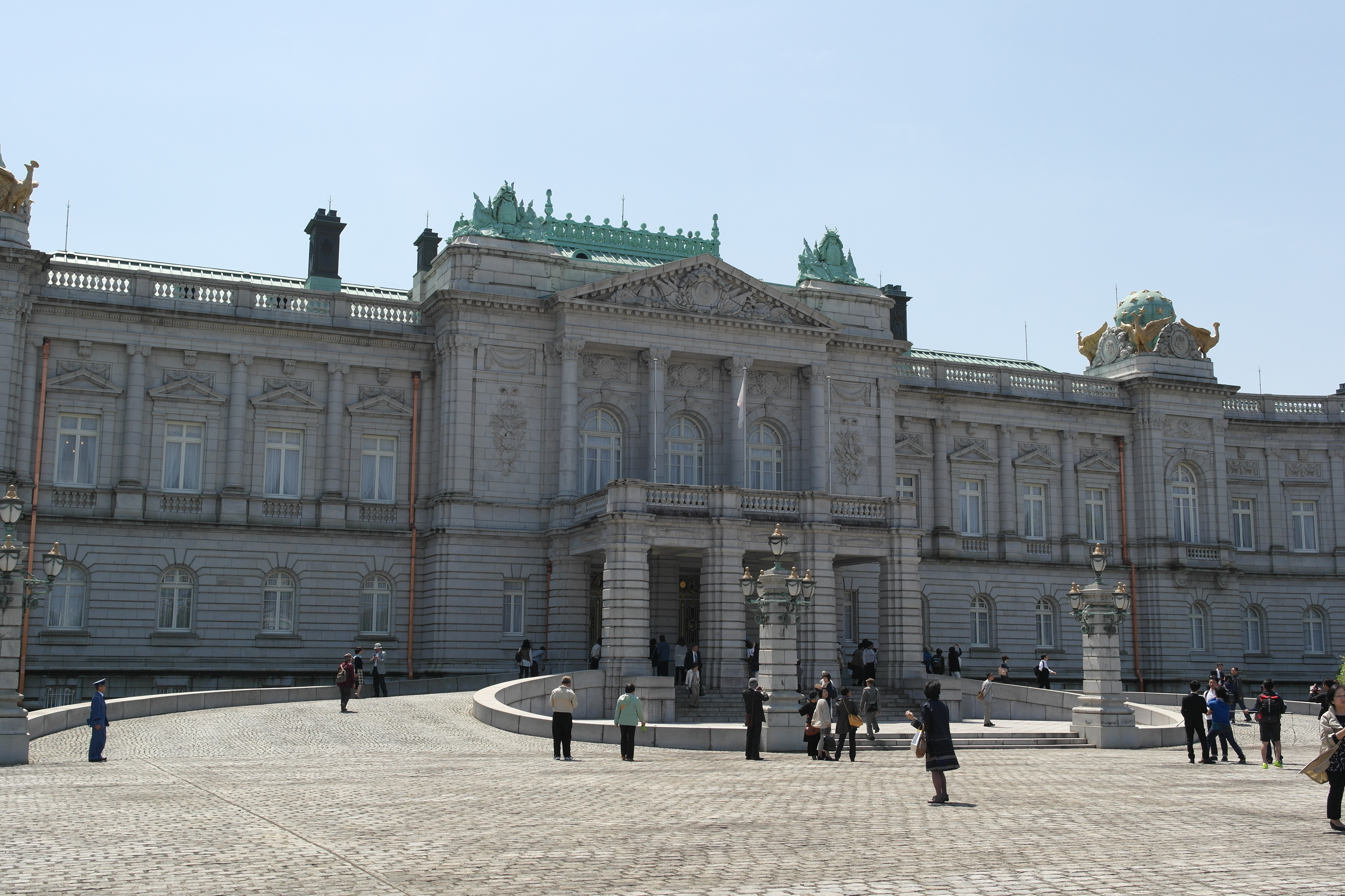 試験的に始まった赤坂迎賓館の一般開放での様子